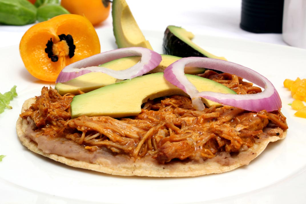 Tortilla de maíz semifrita, untada de frijoles refritos, cochinita pibil y decorado con aguacate y cebollita morada